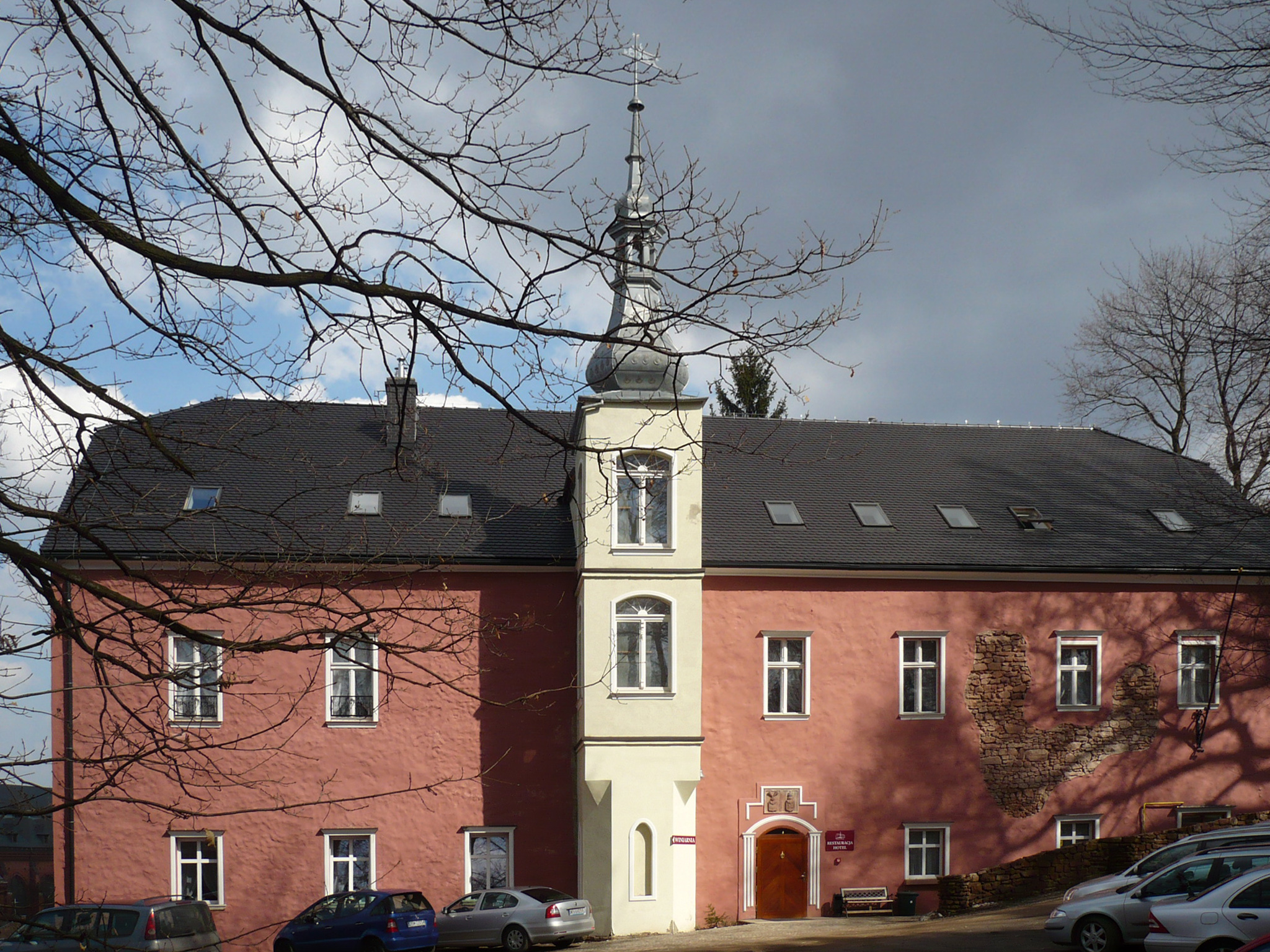 Nowa Ruda, ul. Kościelna 30 - Dwór Górny, obecnie hotel, XVII, XIX w. (zabytek nr A/940/652/WŁ z 25.05.1977)